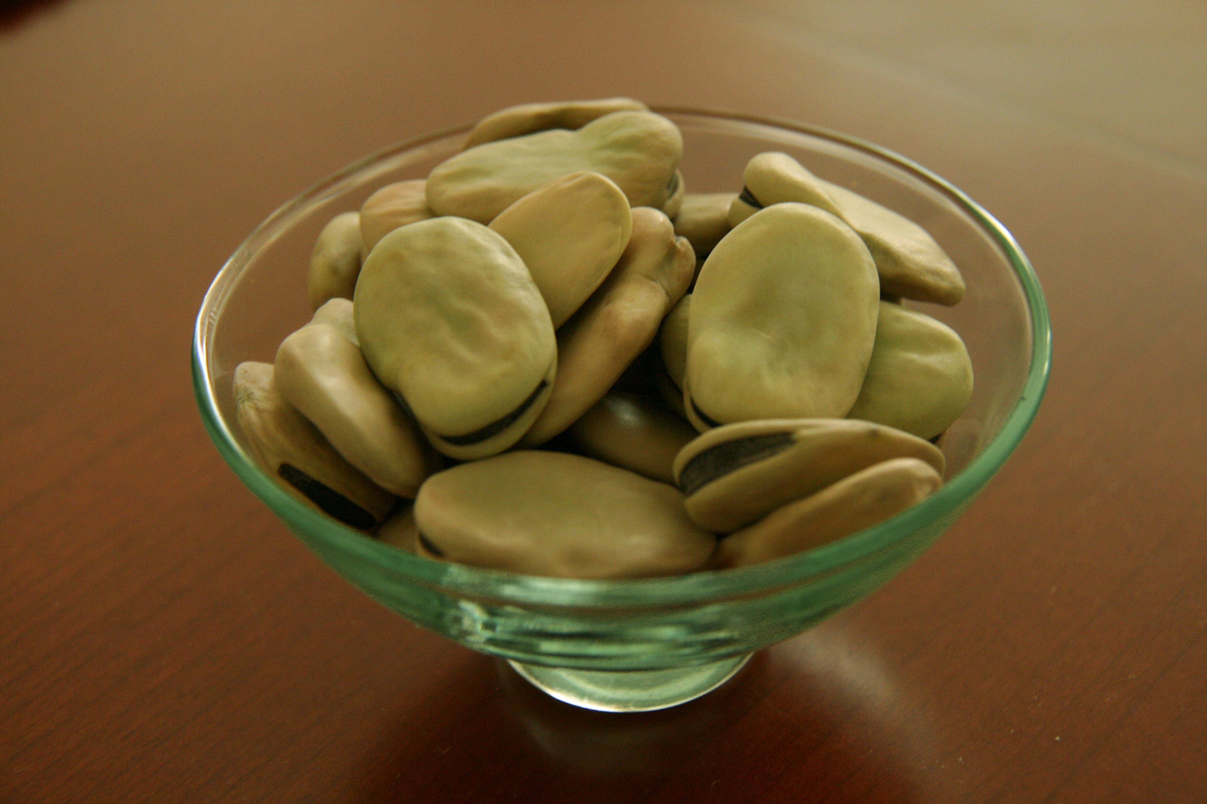 Michirones secos